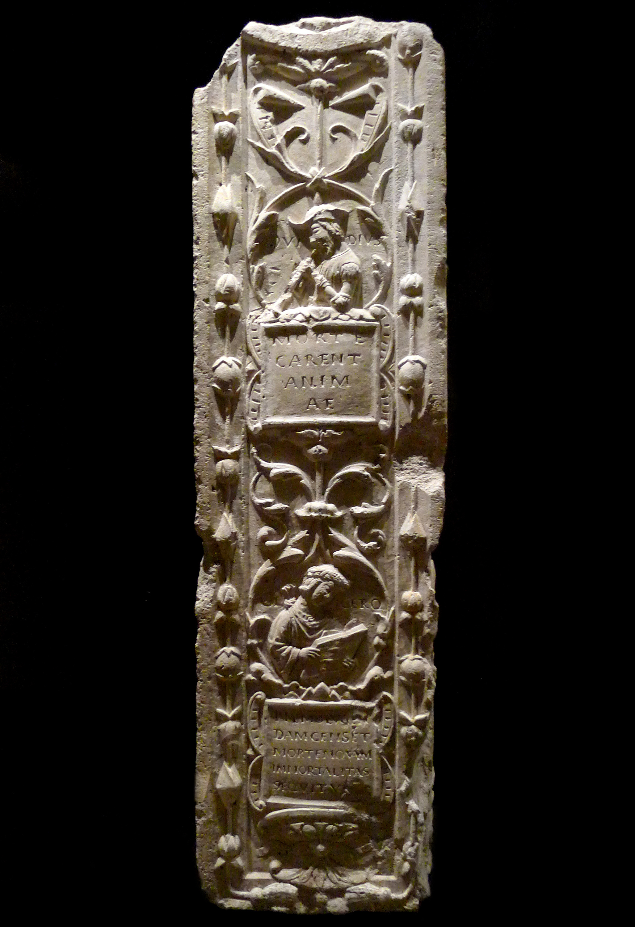 Fragments du tombeau de Jean Olivier, évêque d'Angers (1532-1540), décorés de sentences tirées d'auteurs antiques. Calcaire Avant 1540. Trouvés dans la cathédrale Saint-Maurice d'Angers au niveau de l'aile nord. N° inventaire : MA 1R 105-1,2,3